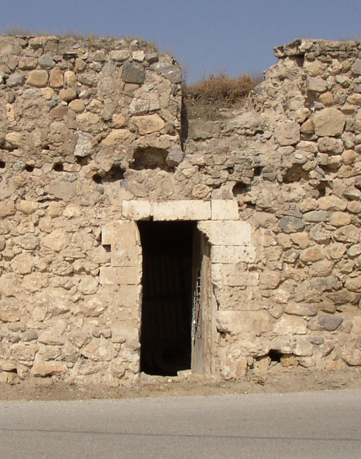 Detalle de la puerta de la torre del Obispo